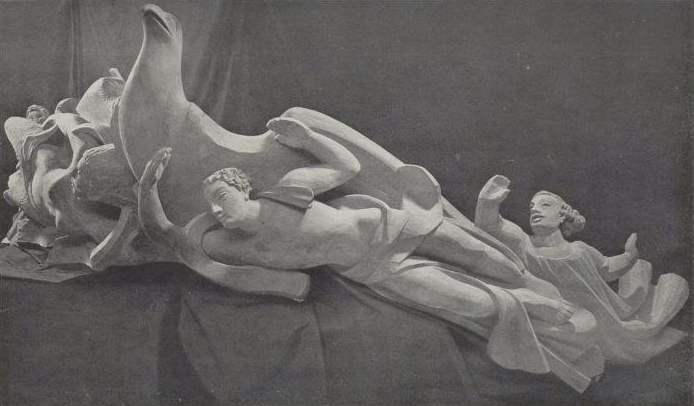 Frits van Hall (beeldhouwwerk in de achtervestibule kajuitsklasse van de 'Nieuw Amsterdam', 1938)